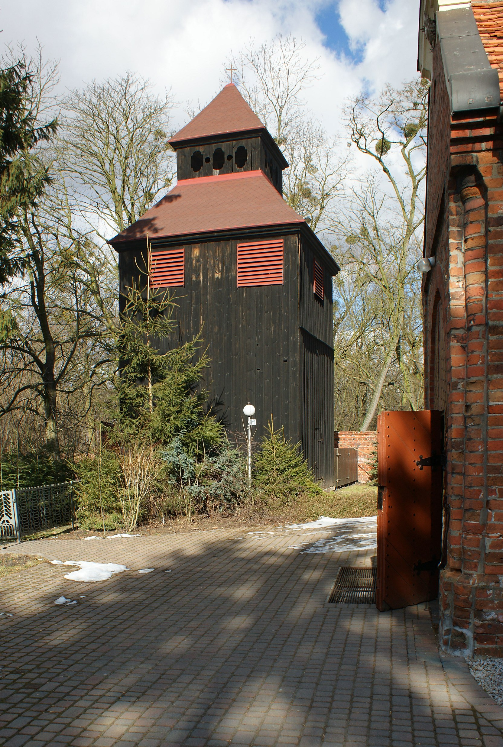 Drewniana dzwonnica z 1797 r. w Sobótce Sobótka, Ostrów Wielkopolski